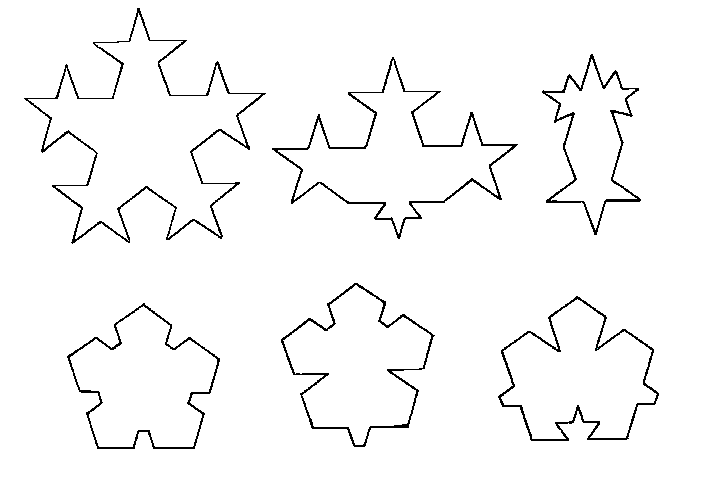 Penrose első nem periodikus csempehalmaza